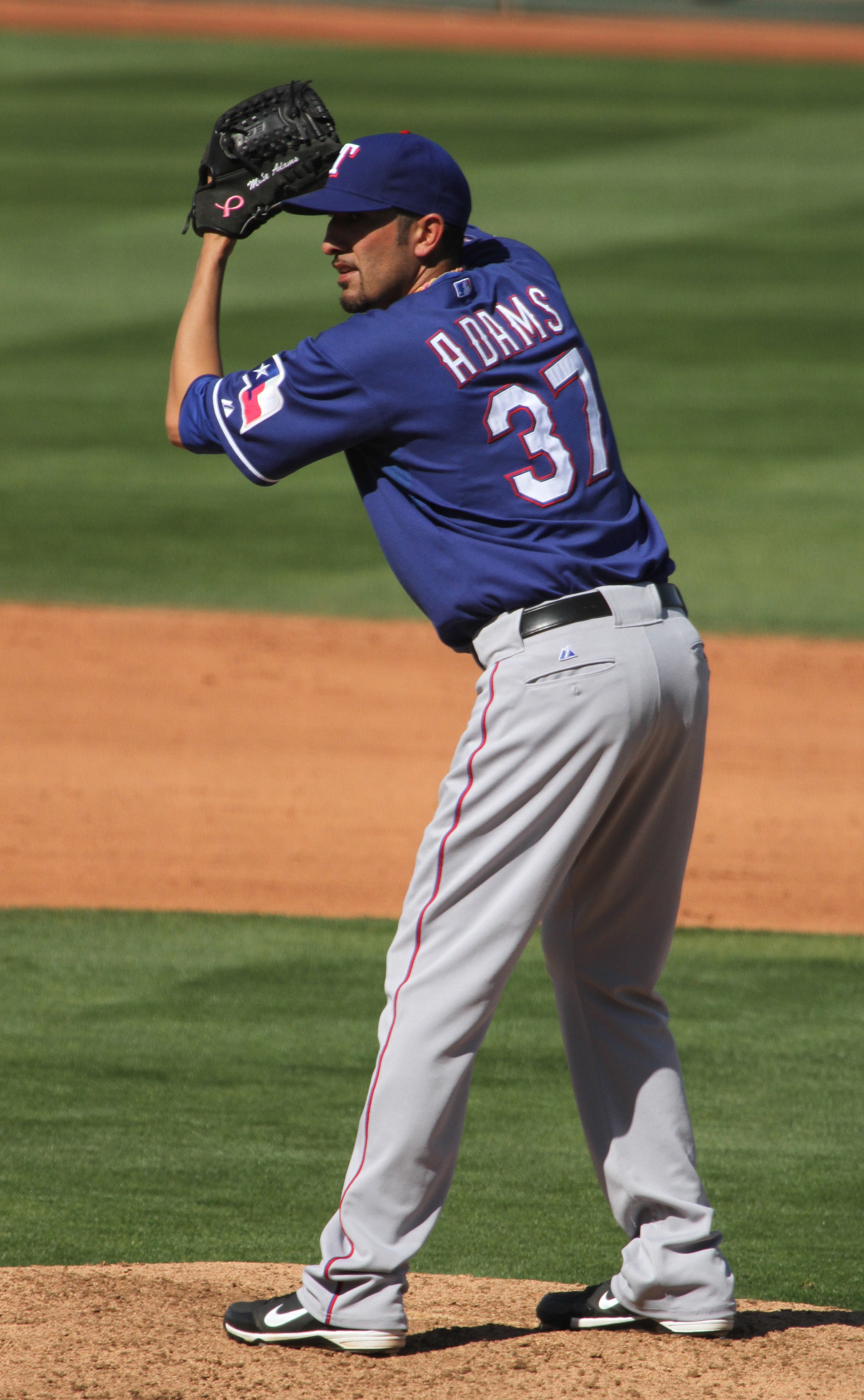 Mike Adams